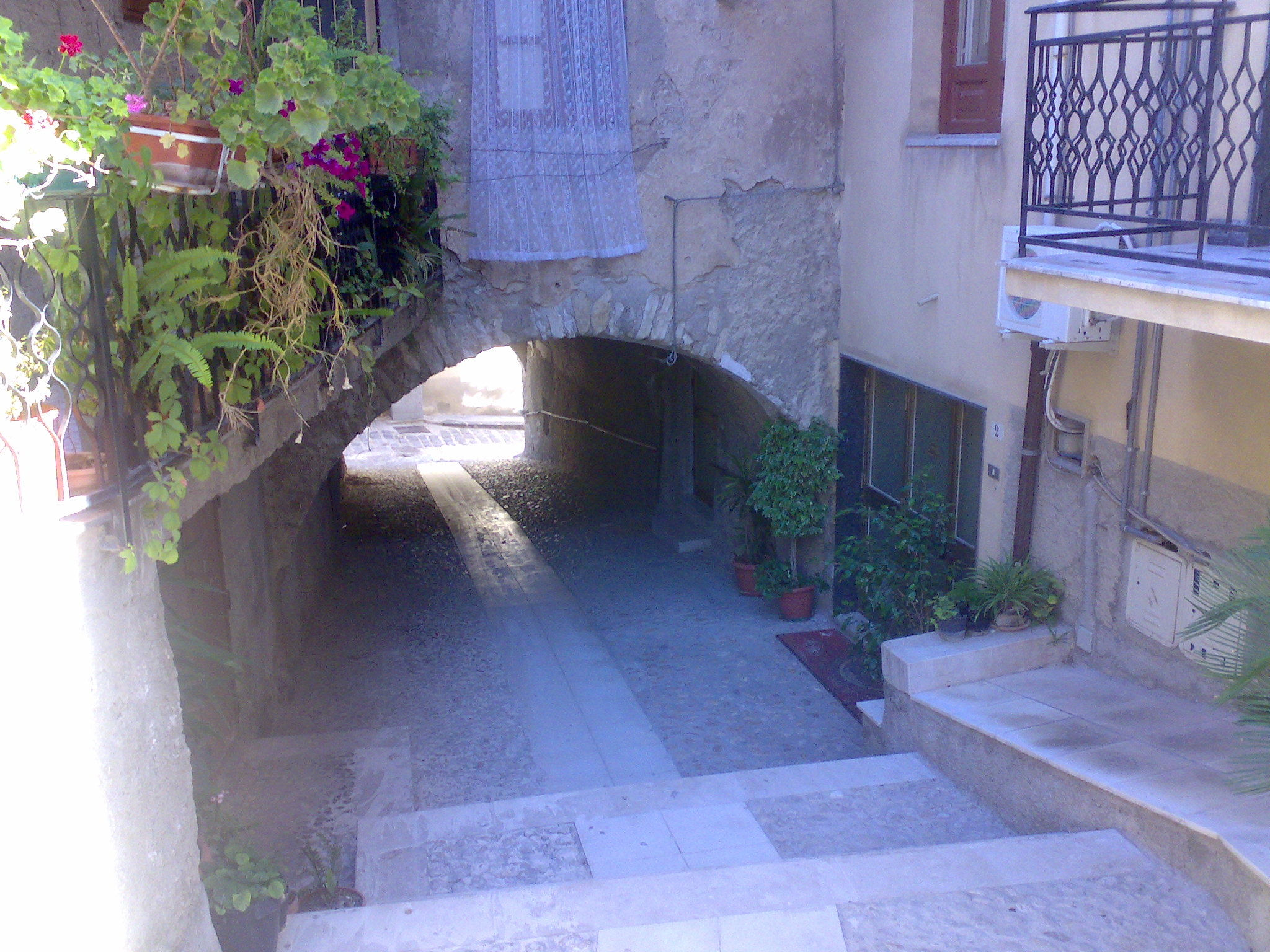 Xanèa